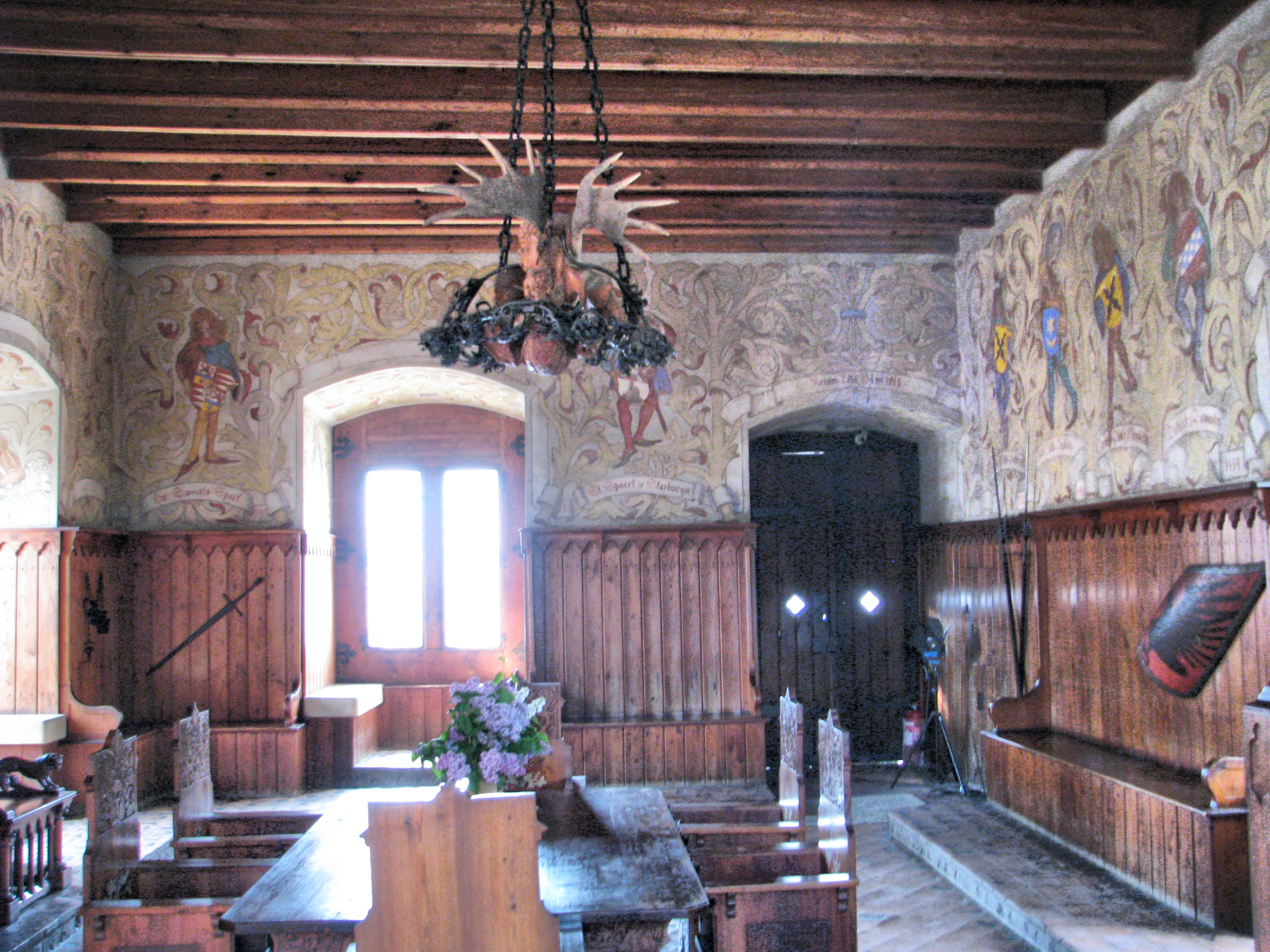 Hrad Kokořín, na skále u státní silnice, Kokořínský Důl.